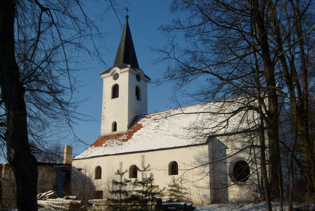 Kostej sv.Jana Křtitele v Krabonoši